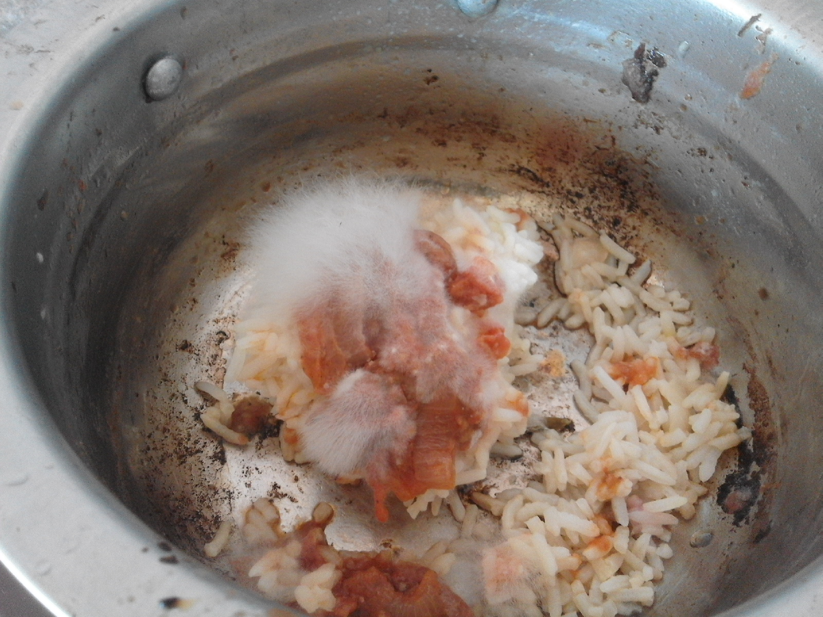 hypha on rice and tomato sauce